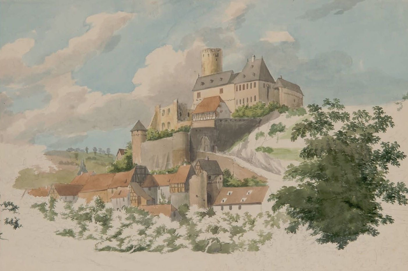 Burg Eppstein, aquarellierte Bleistiftzeichnung